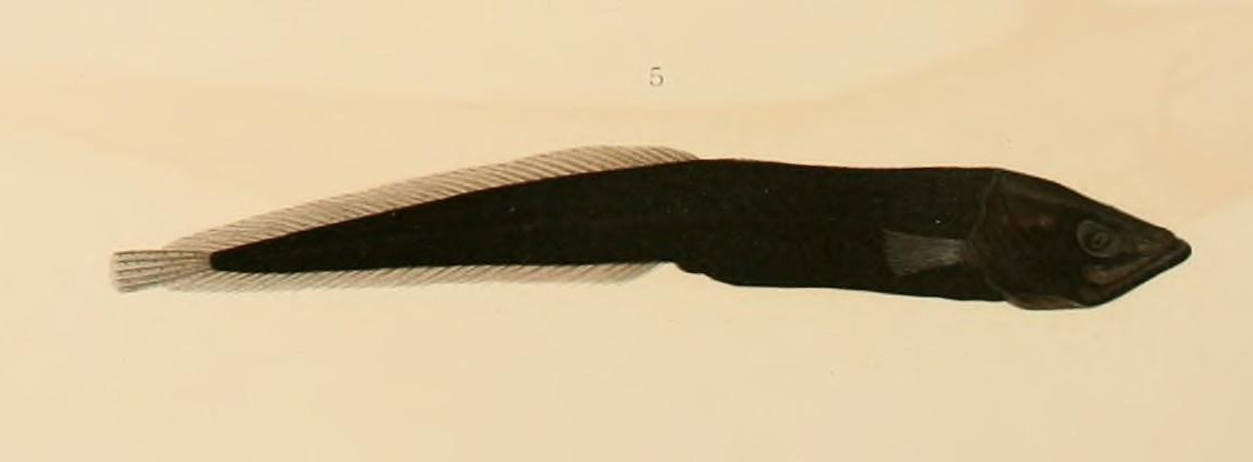 Parabrotula plagiophthalmus Zugmayer, 1911